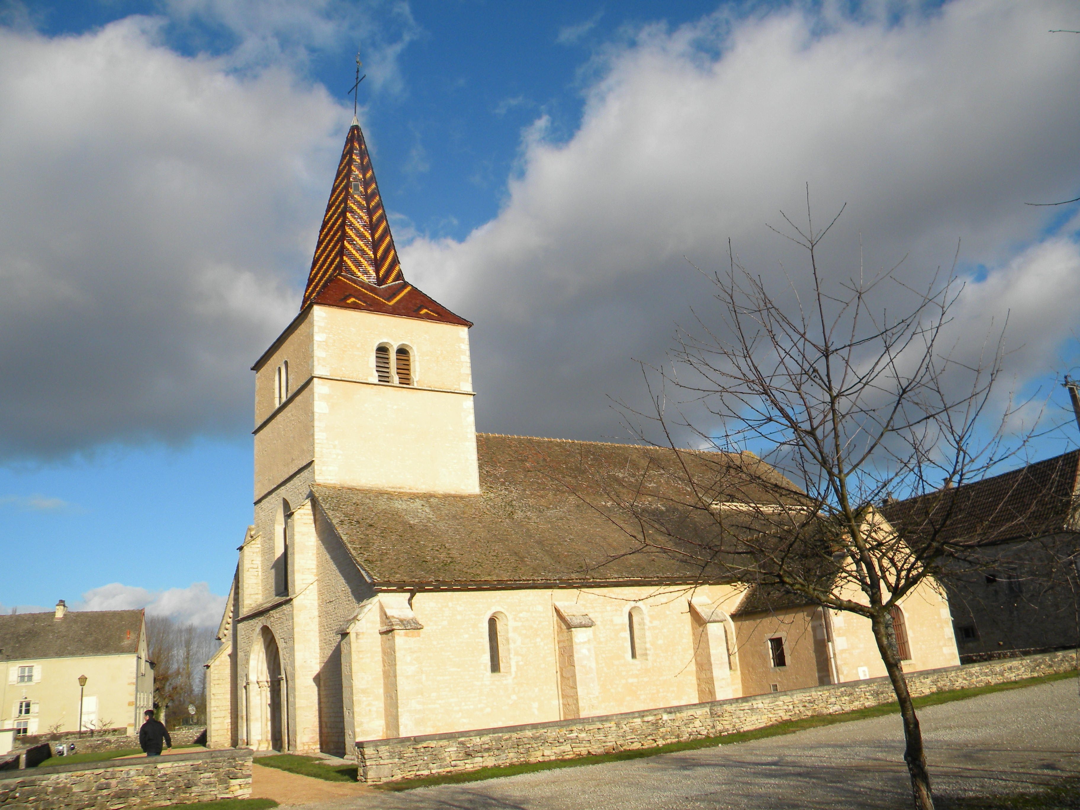 Preĝejo Sanint Verran de_Chaudenay